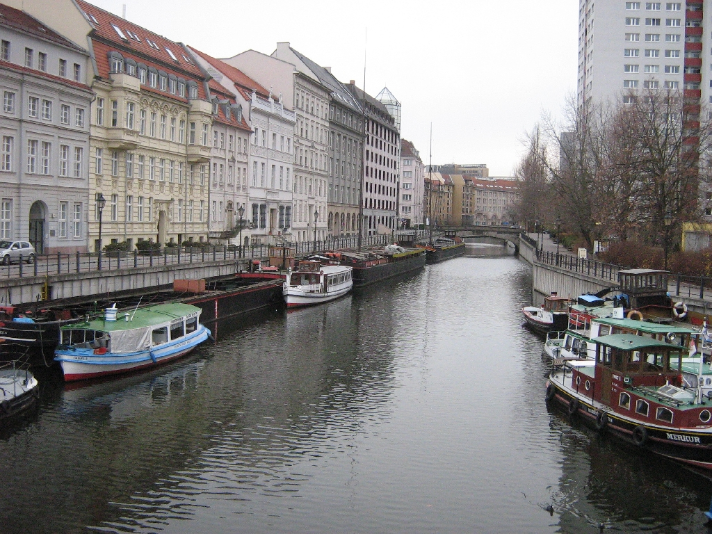 Spree am Märkischen Ufer in Berlin